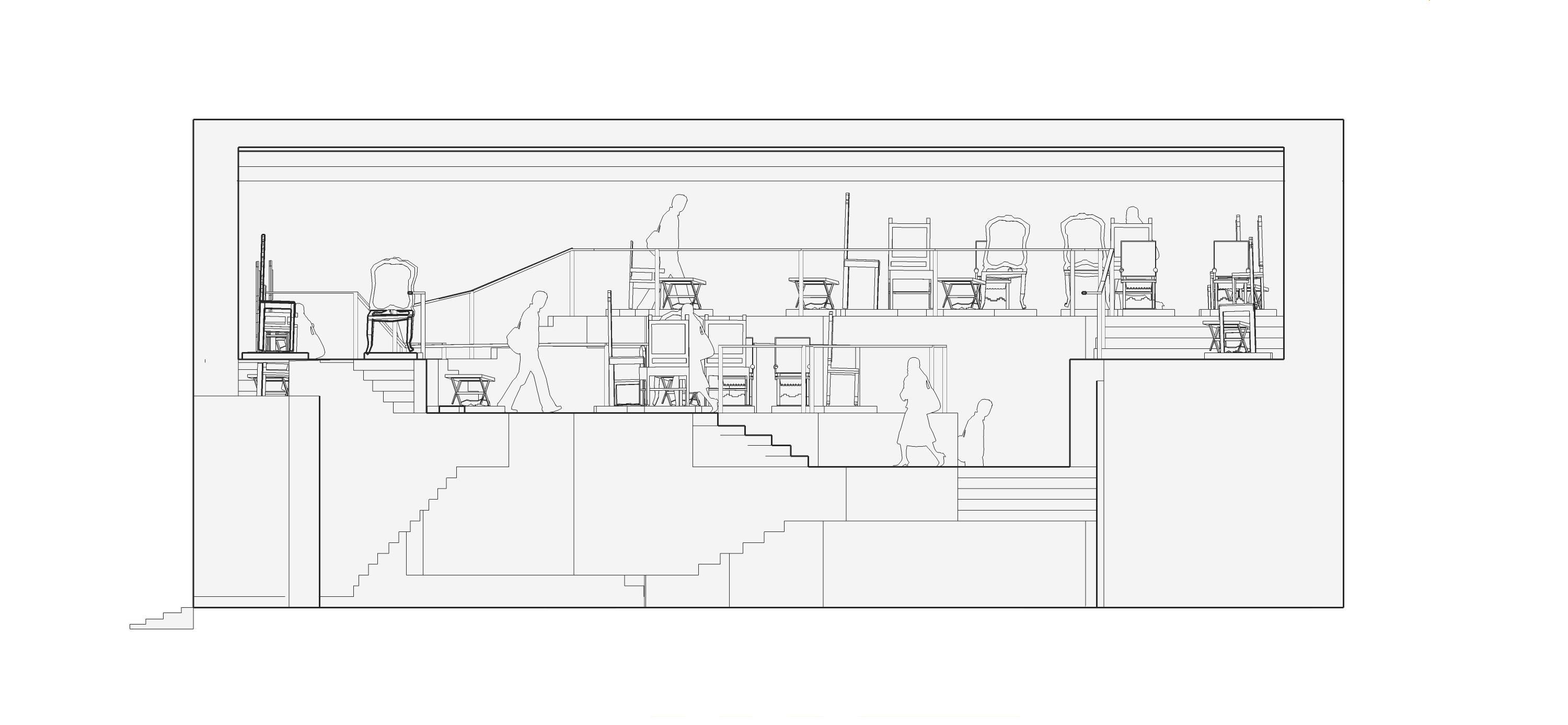 Template:Screenshotcopyrighted